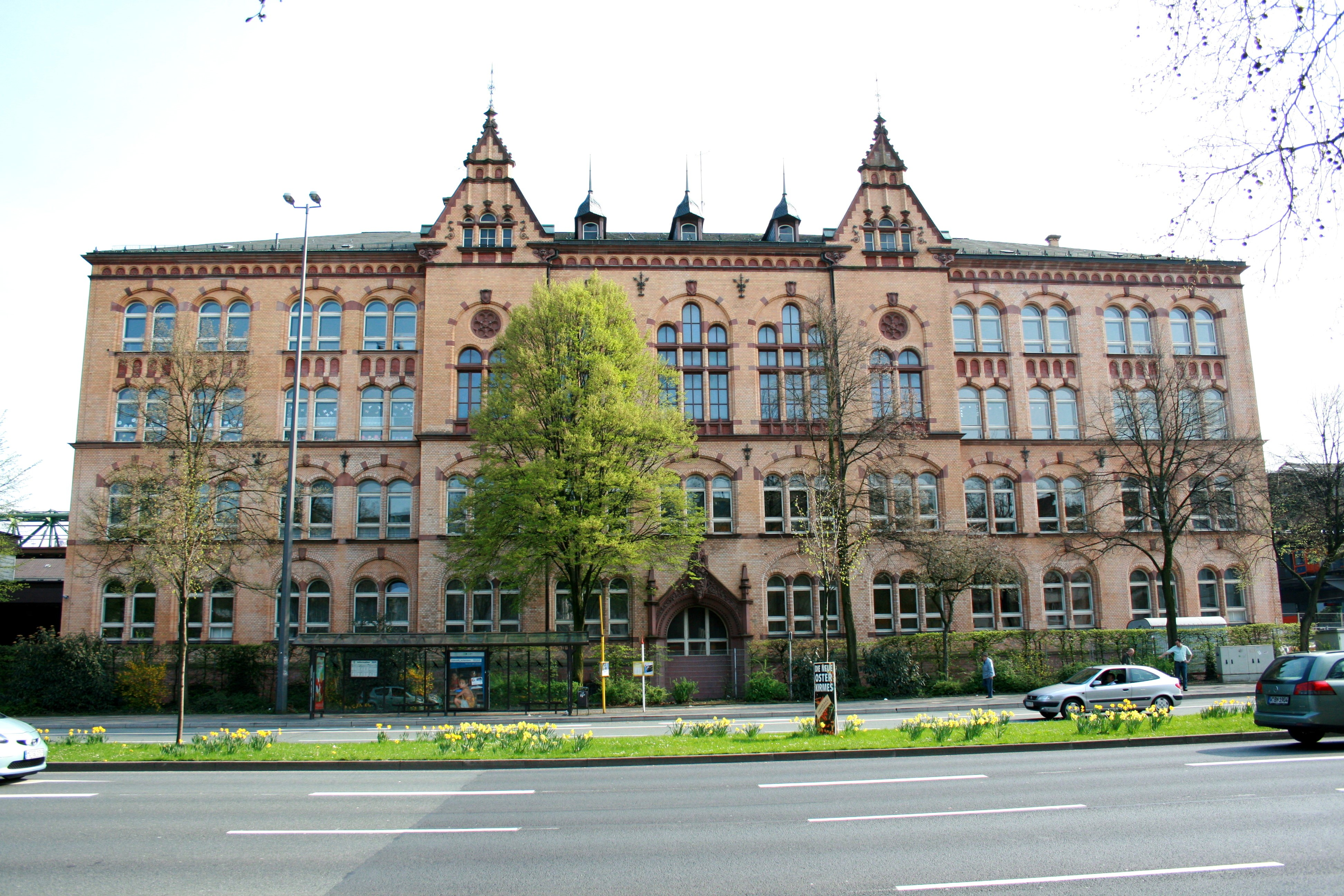 Katholische Hauptschule an der Bundesallee in Wuppertal